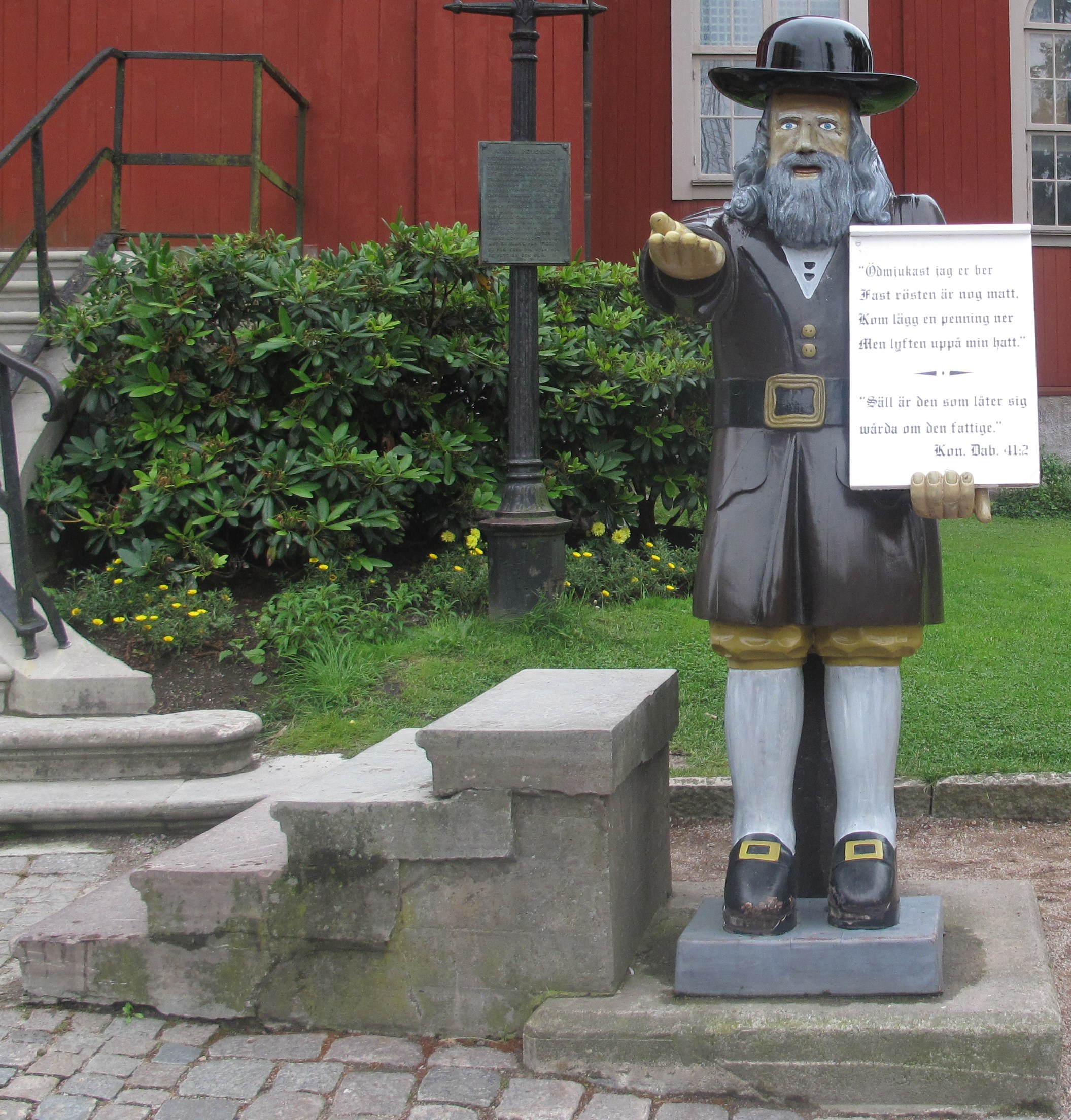 Gubben Rosenbom i Karlskrona.